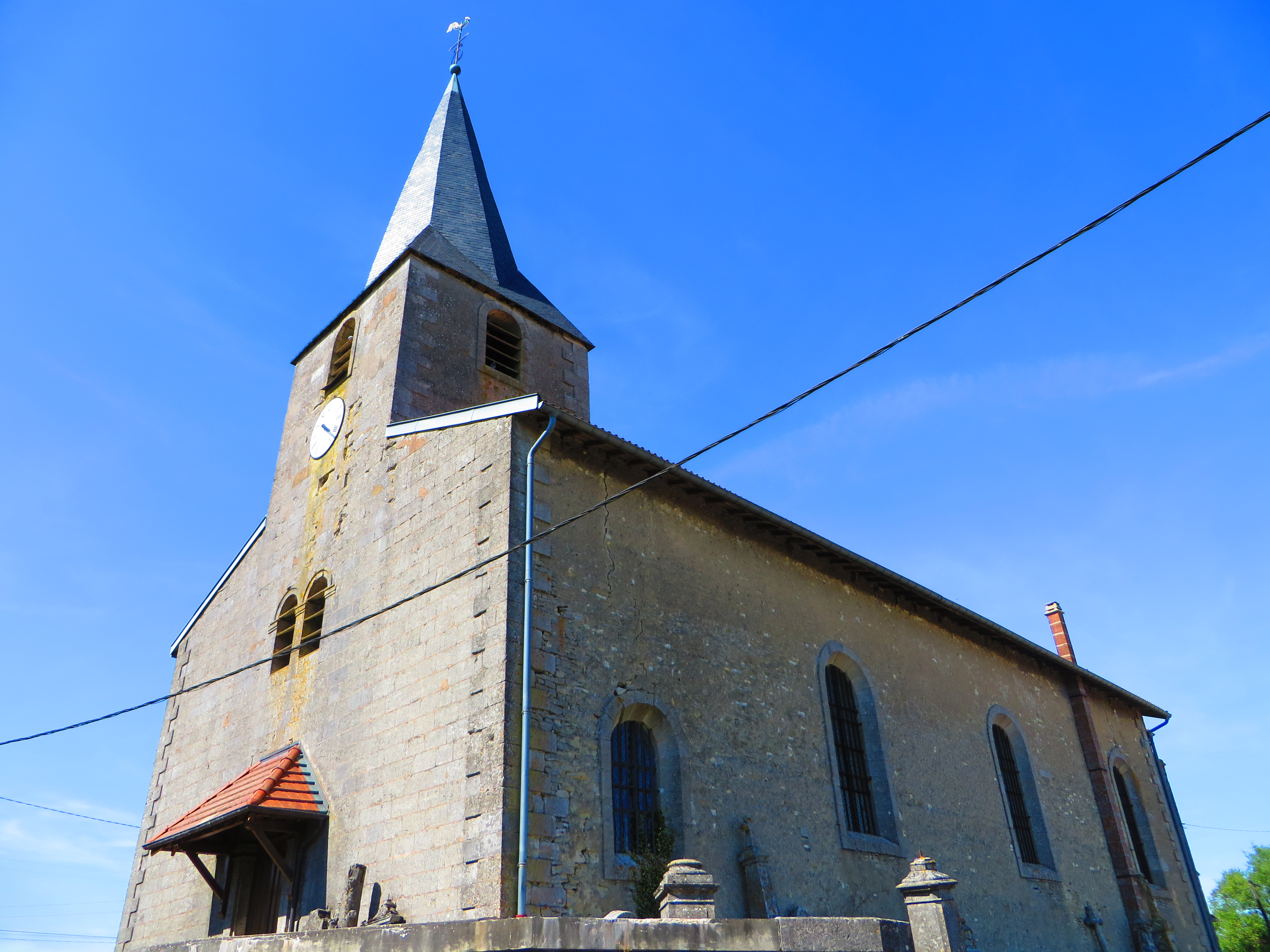 Lemmes L'église Saint-Laurent